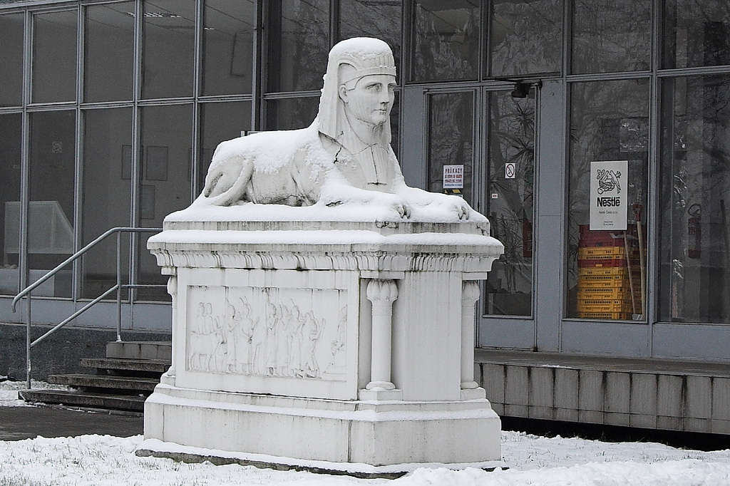 Socha Sfingy před vstupem do závodu Nestlé v Holešově Všetulích